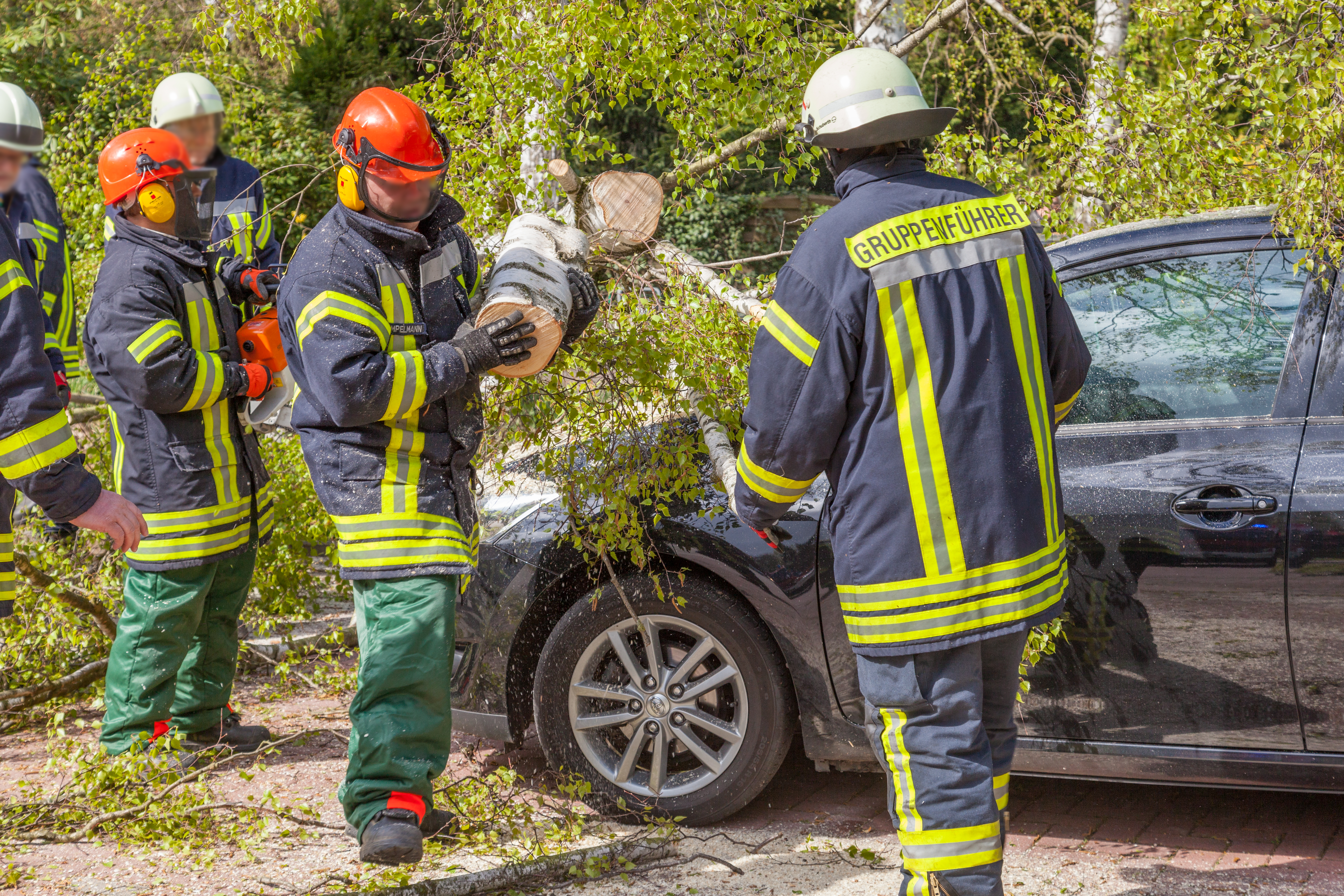 Die Freiwillige Feuerwehr Stadt Syke beseitigt eine umgefallenen Birke nach einem Sturm.